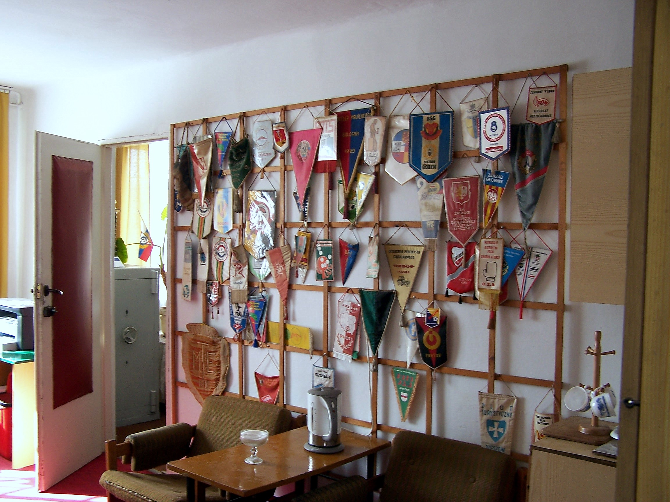 Wnętrze siedziby Stali Sanok ulica Stróżowska